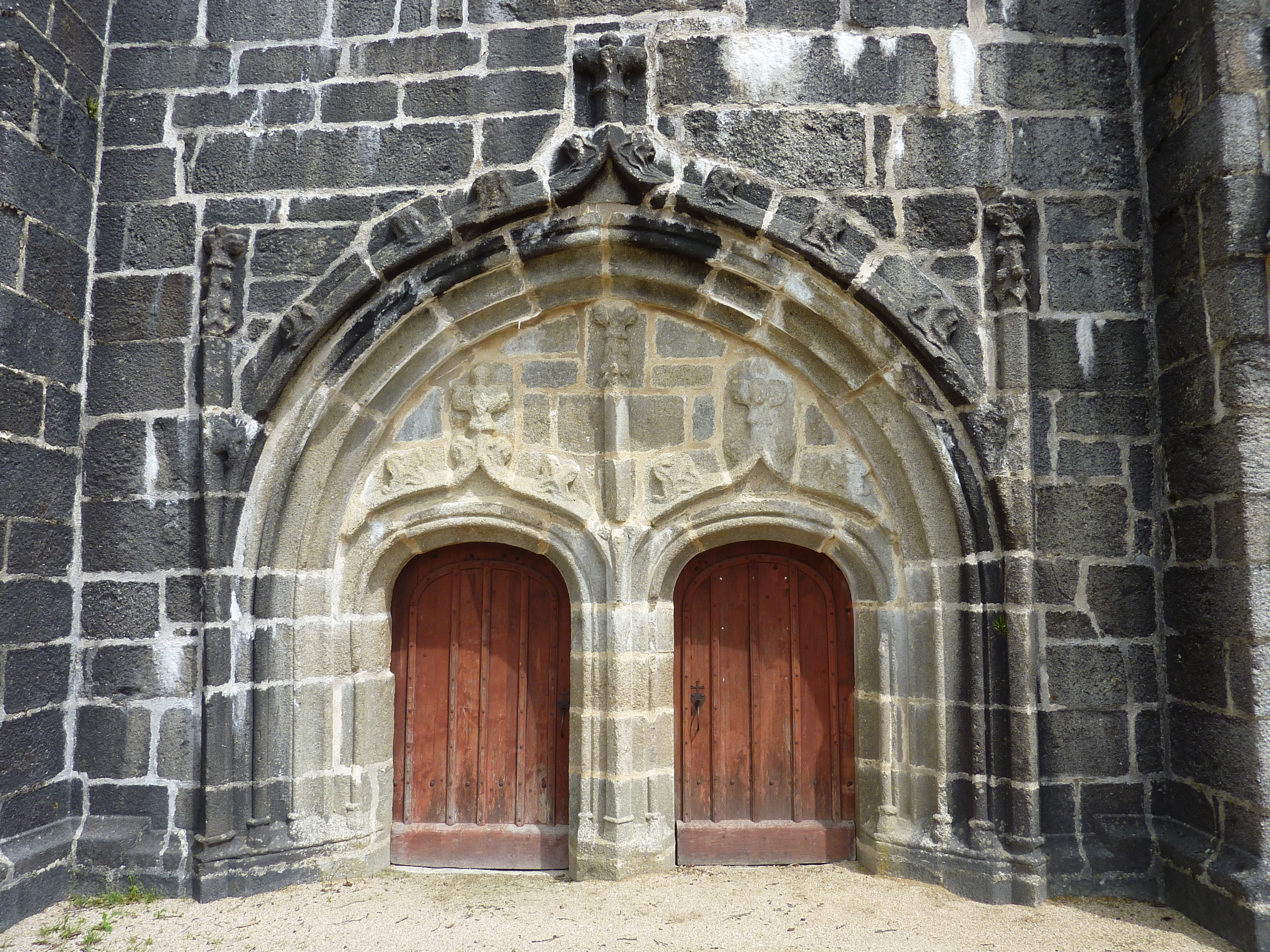 Eglise de Brennilis portail ouest